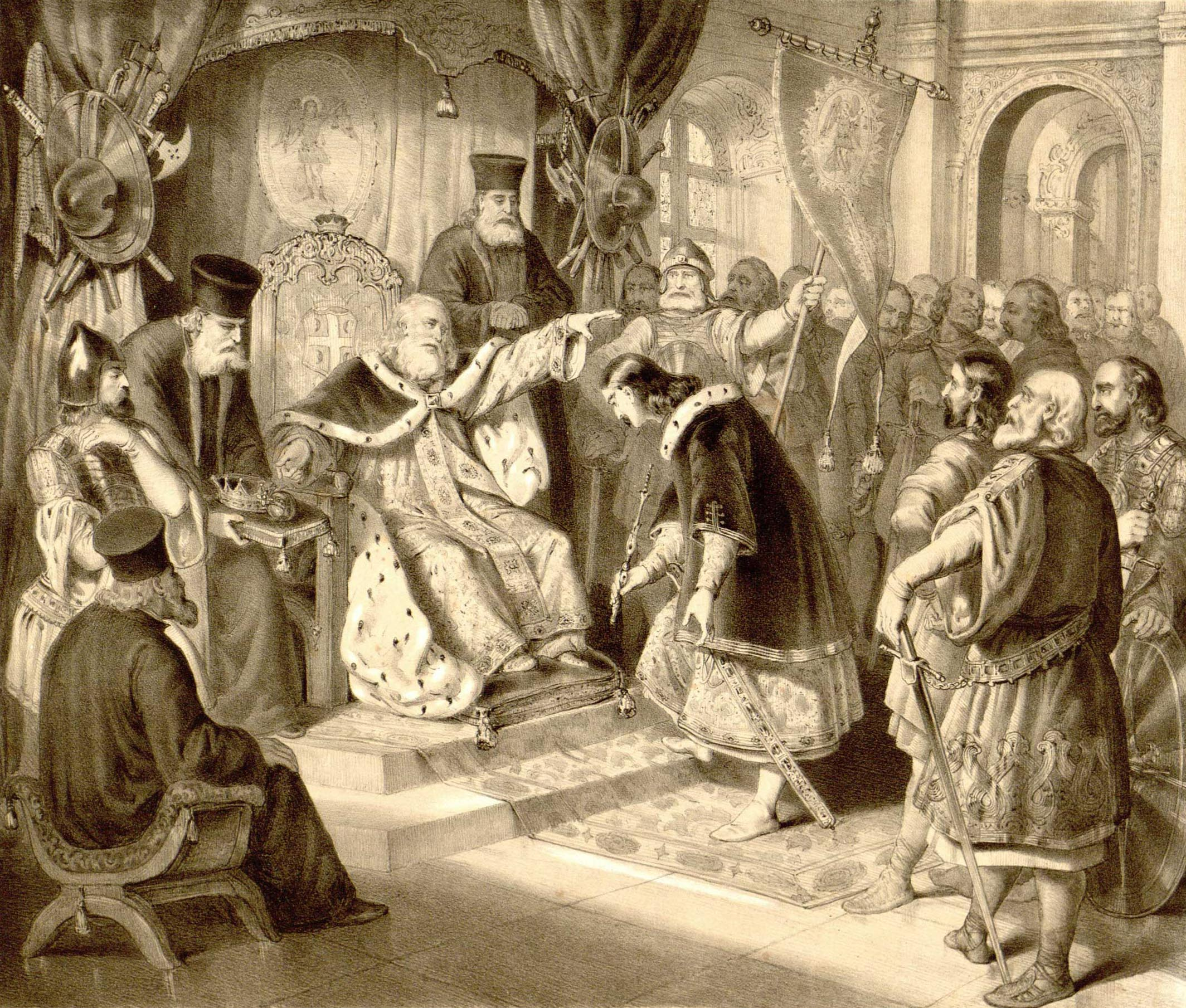 Стефан Немања предаје са благословом владу србску сину свом Стефану Првовенчаном